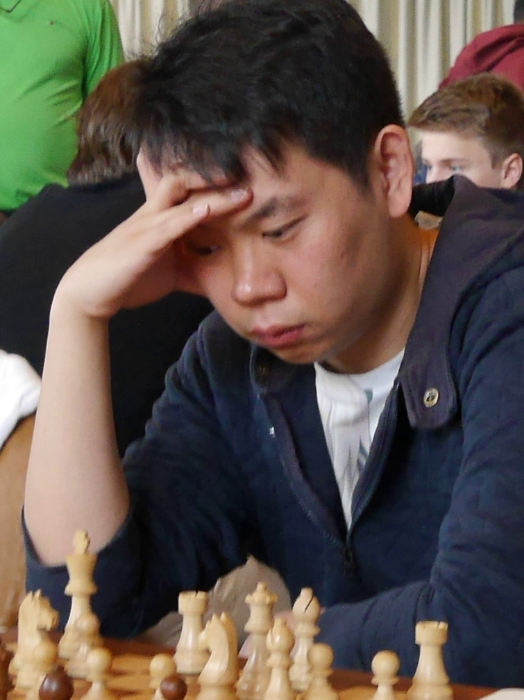 Wang Hao, Runde 4 Grenke Chess Open 2018 in Karlsruhe.